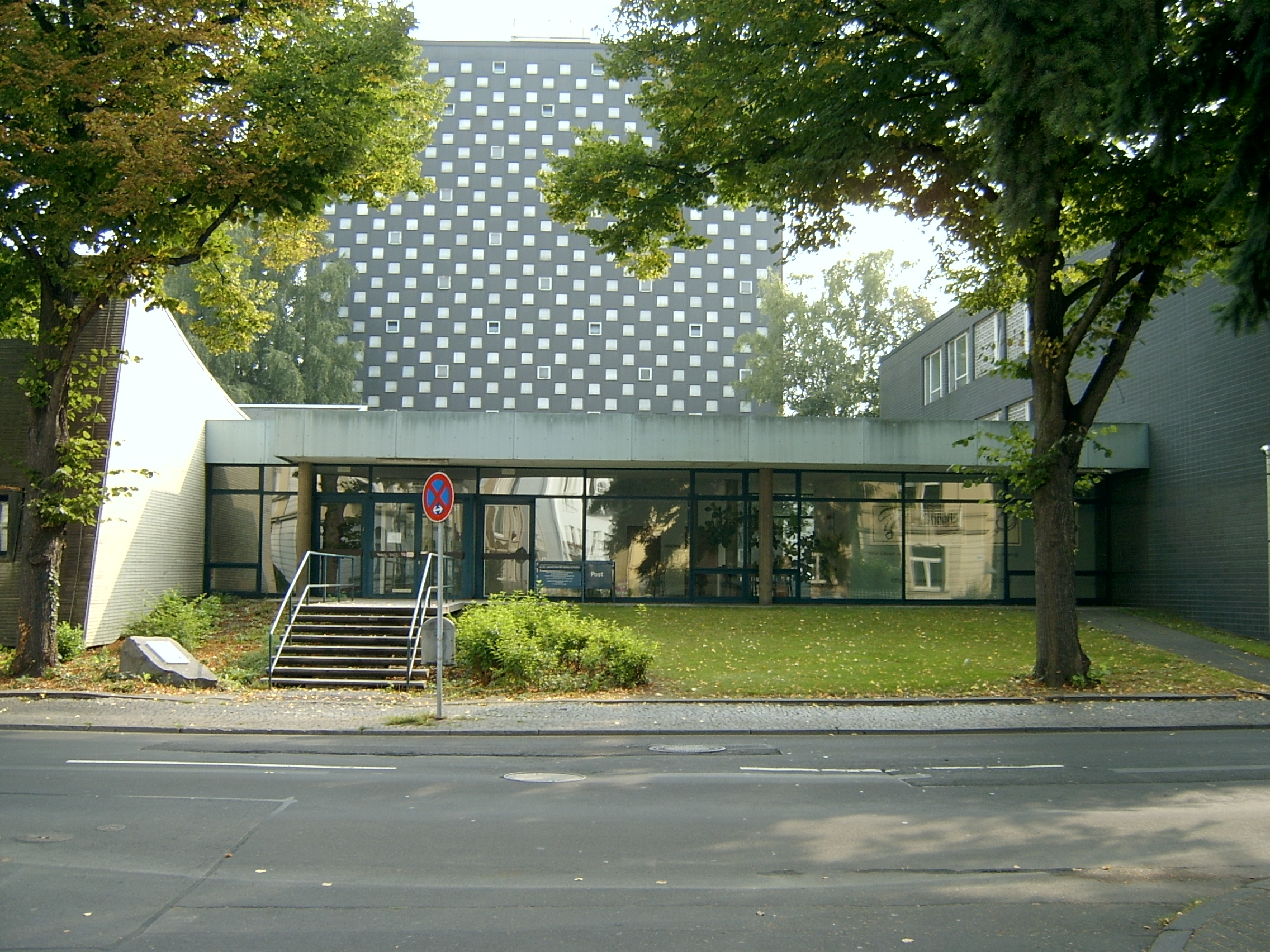 Die Alte Universitätsbibliothek in Gießen.